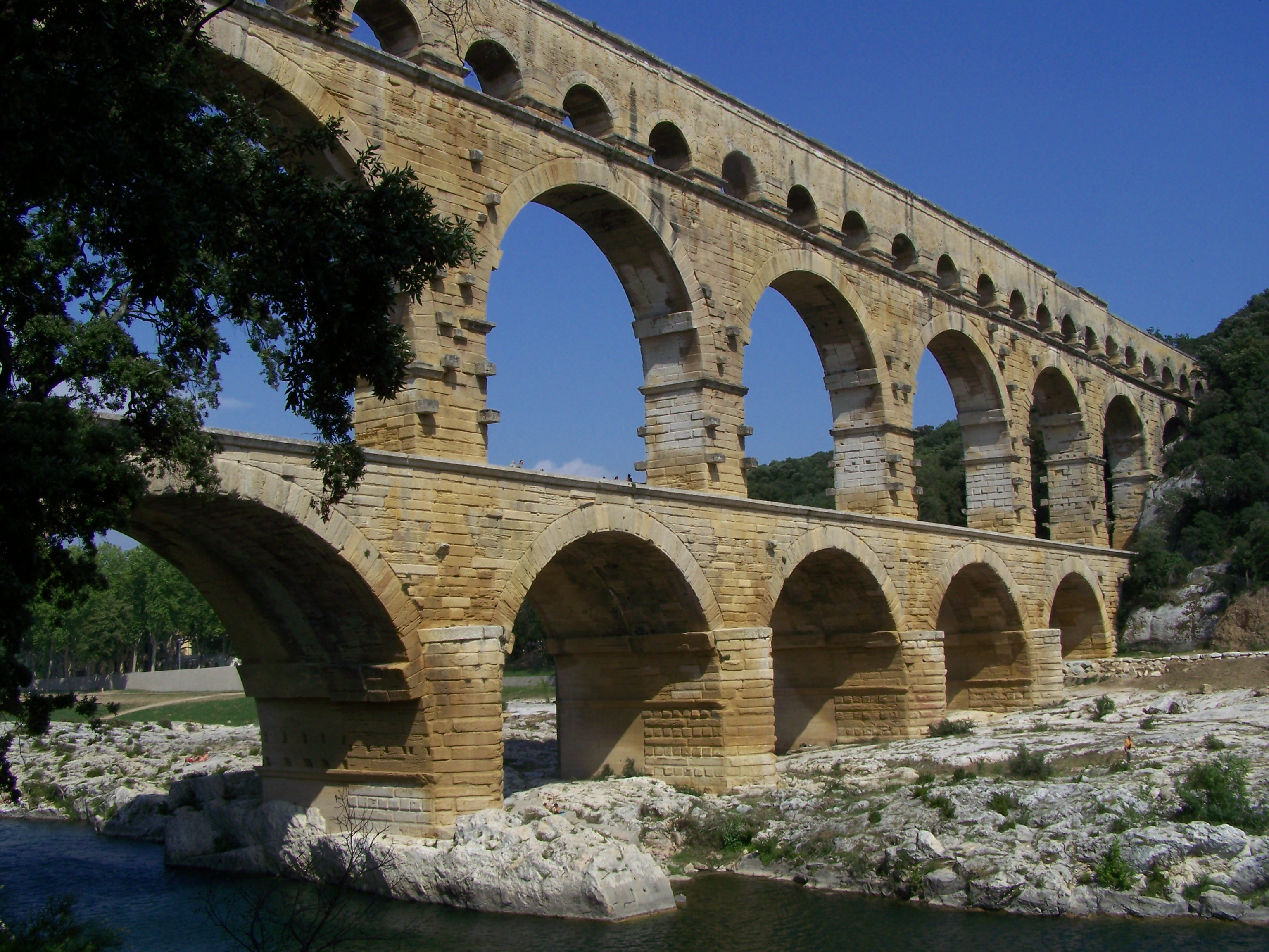 Pont du Gard -2- 13.06.2007